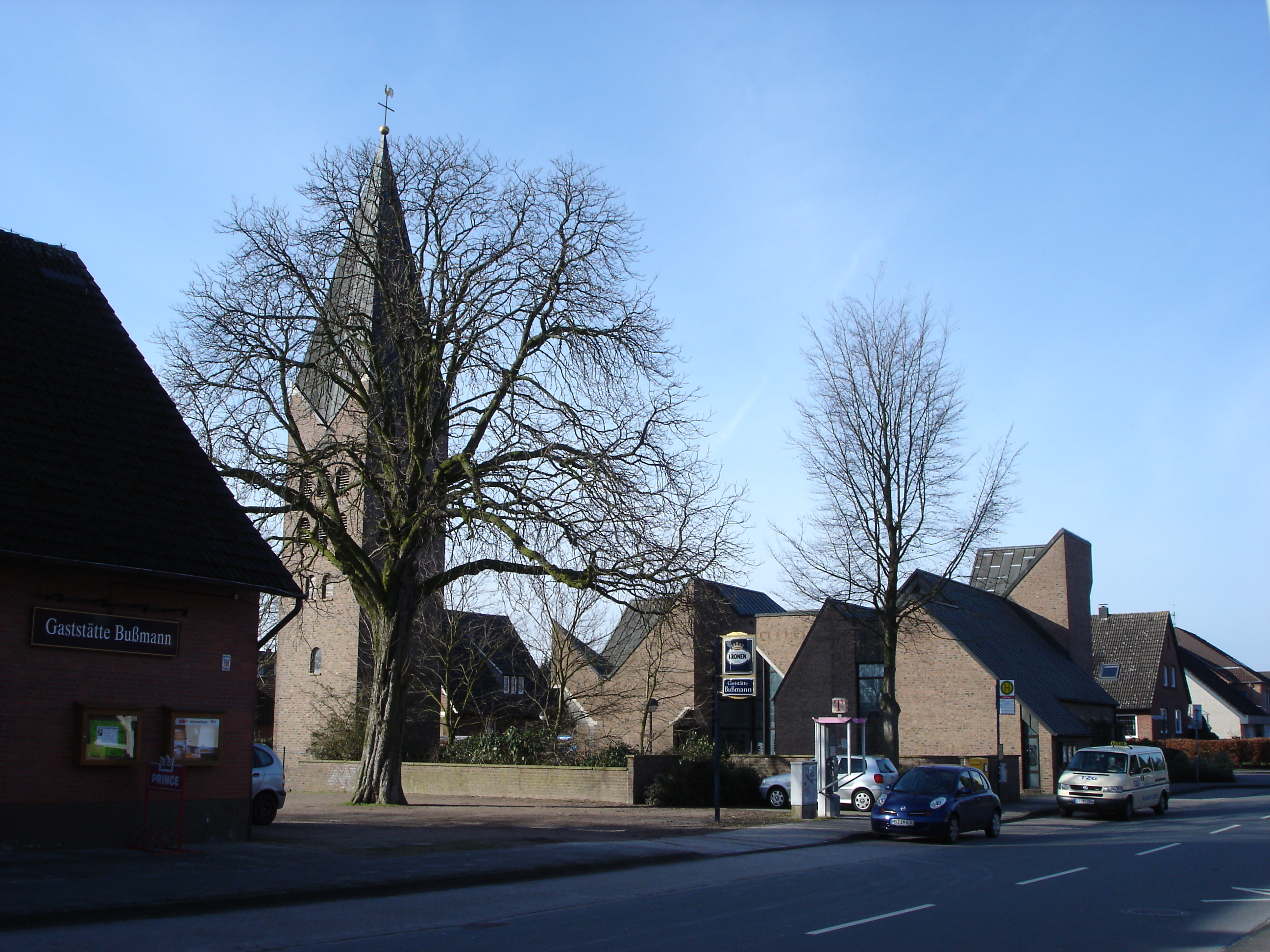 Münster-Gelmer, Germany